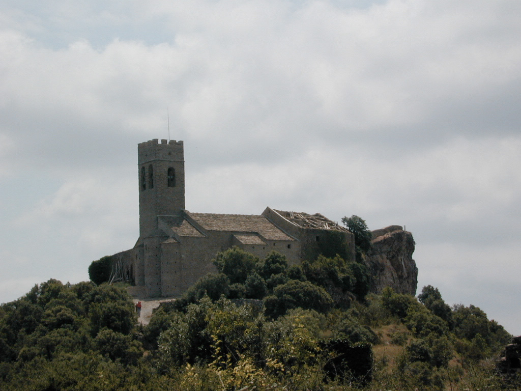 Vista de la Iglesia de Santa María de Muro de Roda en el municipio de La Fueva (Huesca, Aragón)